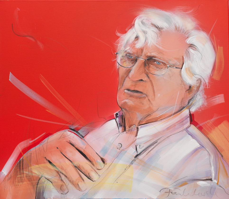 Gemälde von Jochen Kusber